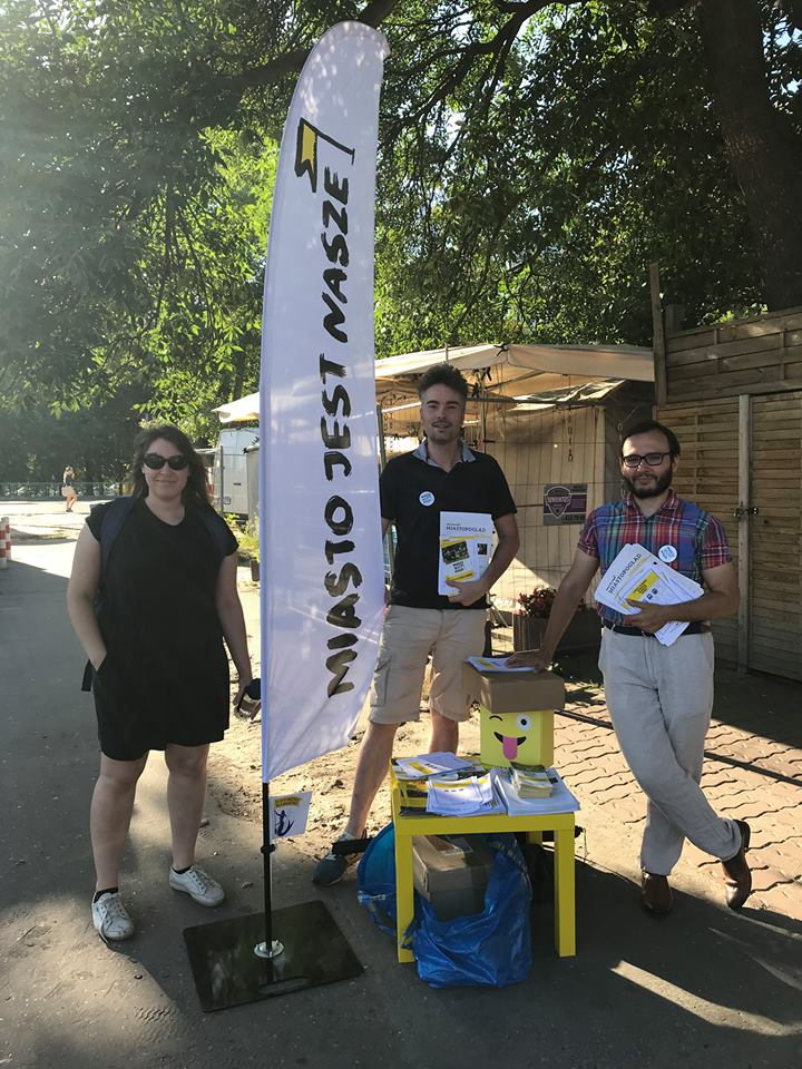 Kampania Miasto Jest Nasze na Mokotowie w 2018; od lewej: Małgorzata Marton, Paweł Przewłocki, Oskar Skoczeń